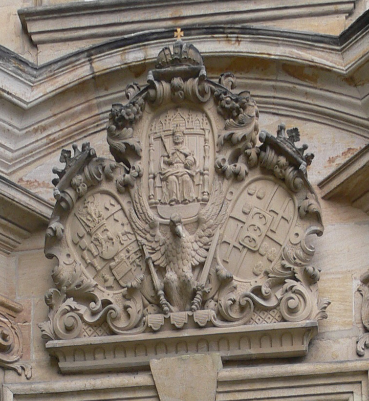 Diözesanmuseum Bamberg (im ehem. Kapitelhaus) Wappen am Portal links (heraldisch rechts): Wappen des Bischofs Friedrich Carl von Schönborn Mitte: Kaiser Heinrich II. rechts (heraldisch links): Wappen des Bischofs Franz Konrad Graf von Stadion und Thannhausen